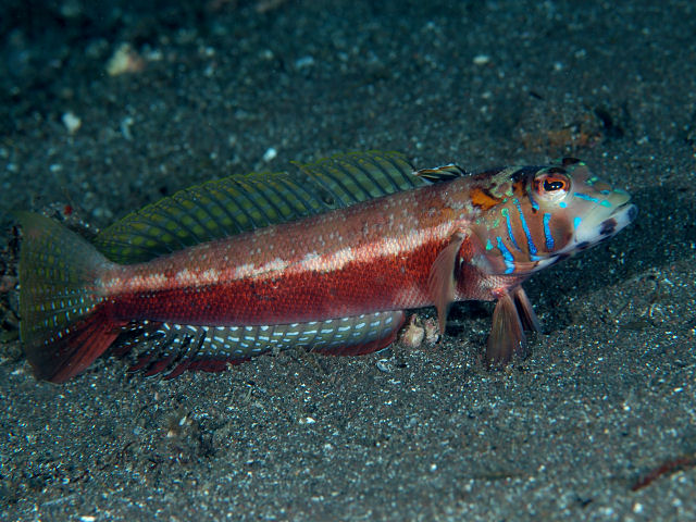 トラギス Parapercis pulchella